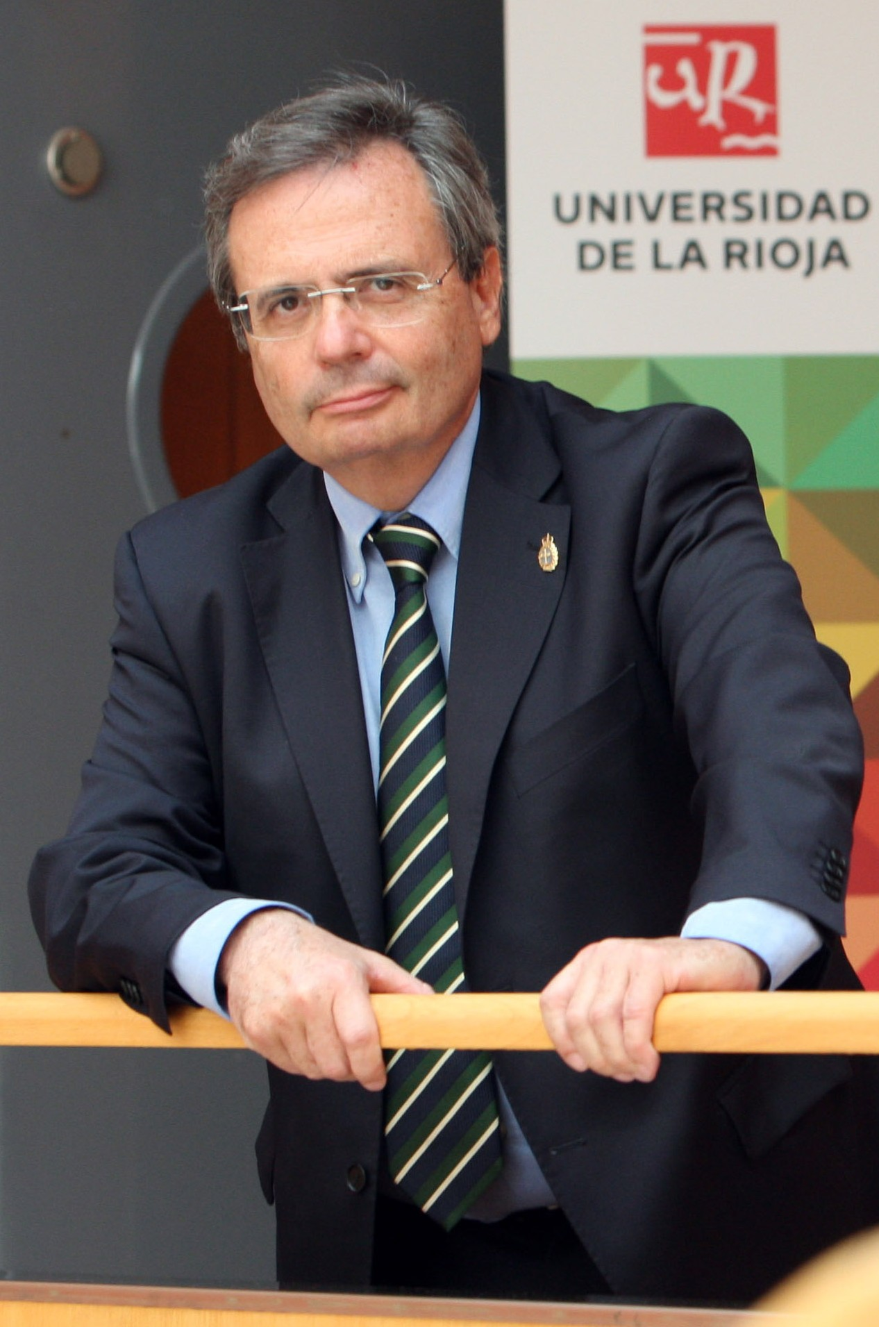 Rafael Matesanz, en la Universidad de La Rioja.